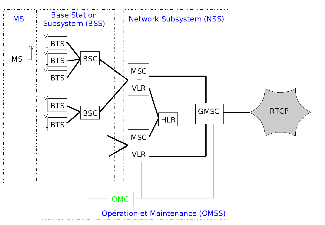 Description sommaire du réseau GSM. Ce diagramme a été dessiné par moi en utilisant OpenOffice 2.0 Draw. Si j'arrivais à insérer le fichier source (.odg) dans la base de données, il serait librement accessible. En attendant, n'hésitez pas à me contacter si vous désirez l'avoir.